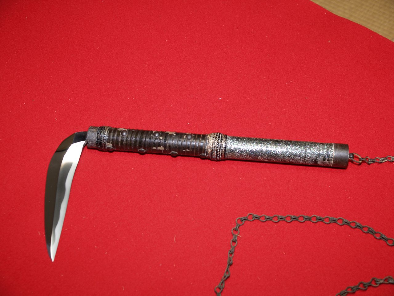 鎖鎌